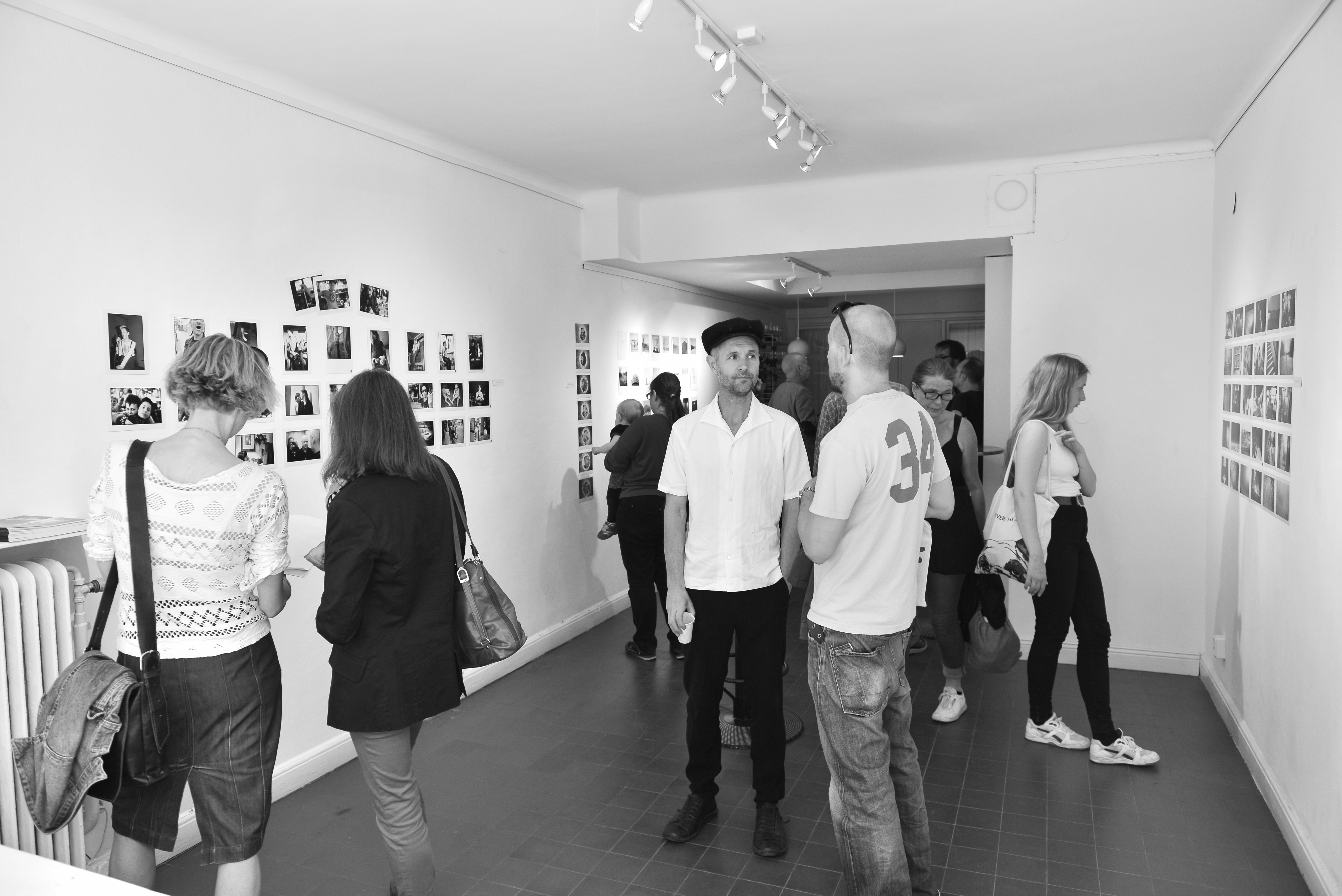 Vernissage, Galleri Korn, Stockholm. Fyra fotografer, tre dagar, 300 bilder.